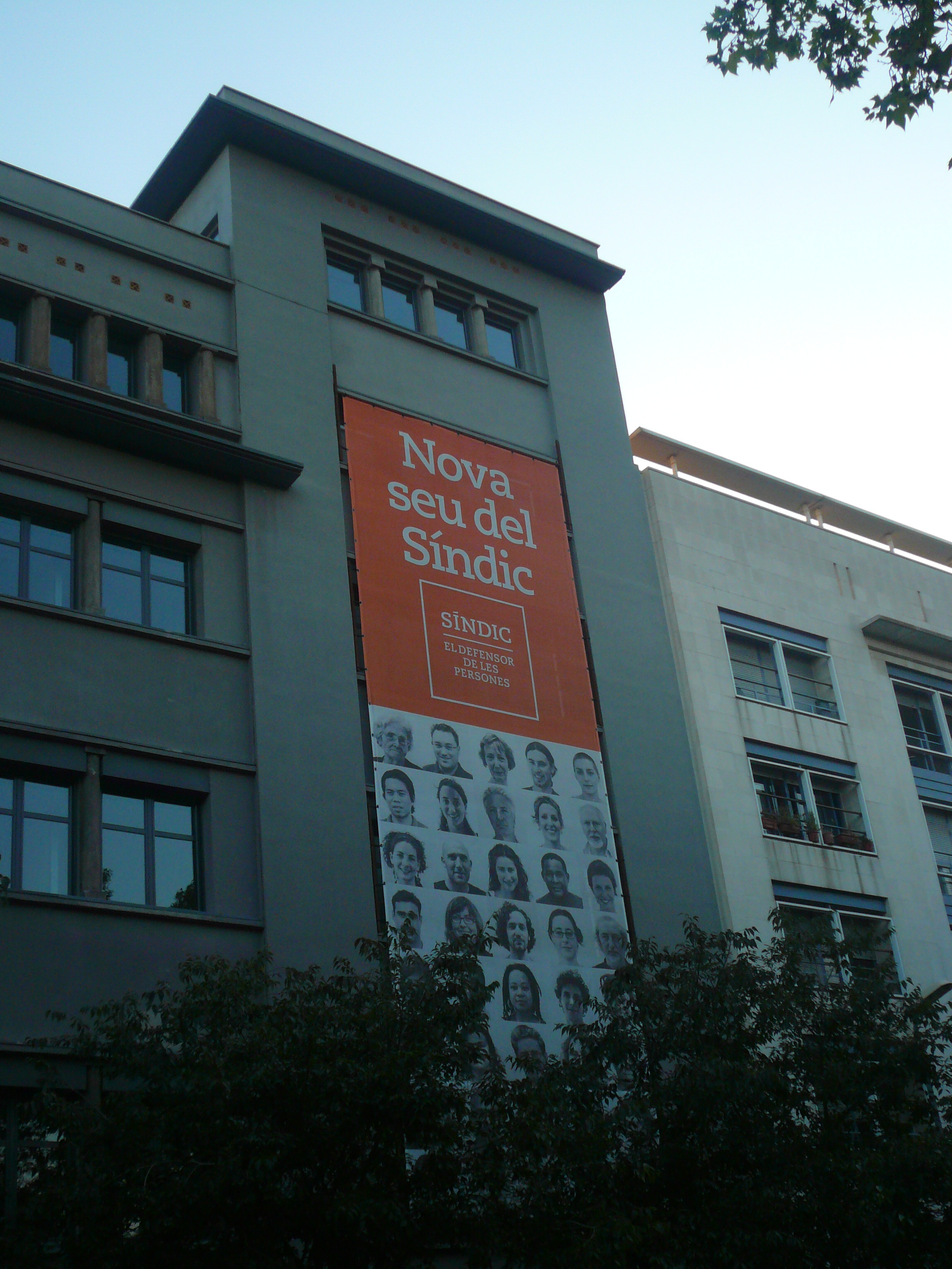 Seu del Síndic de Greuges de Catalunya, al passeig Lluís Companys de Barcelona